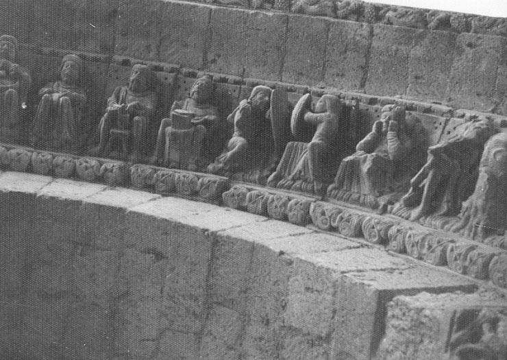 Iglesia de Santiago. Esculturas 1971 - Carrión de los Condes (Palencia) - Fotografía. Papel 750 x 105 mm B/N